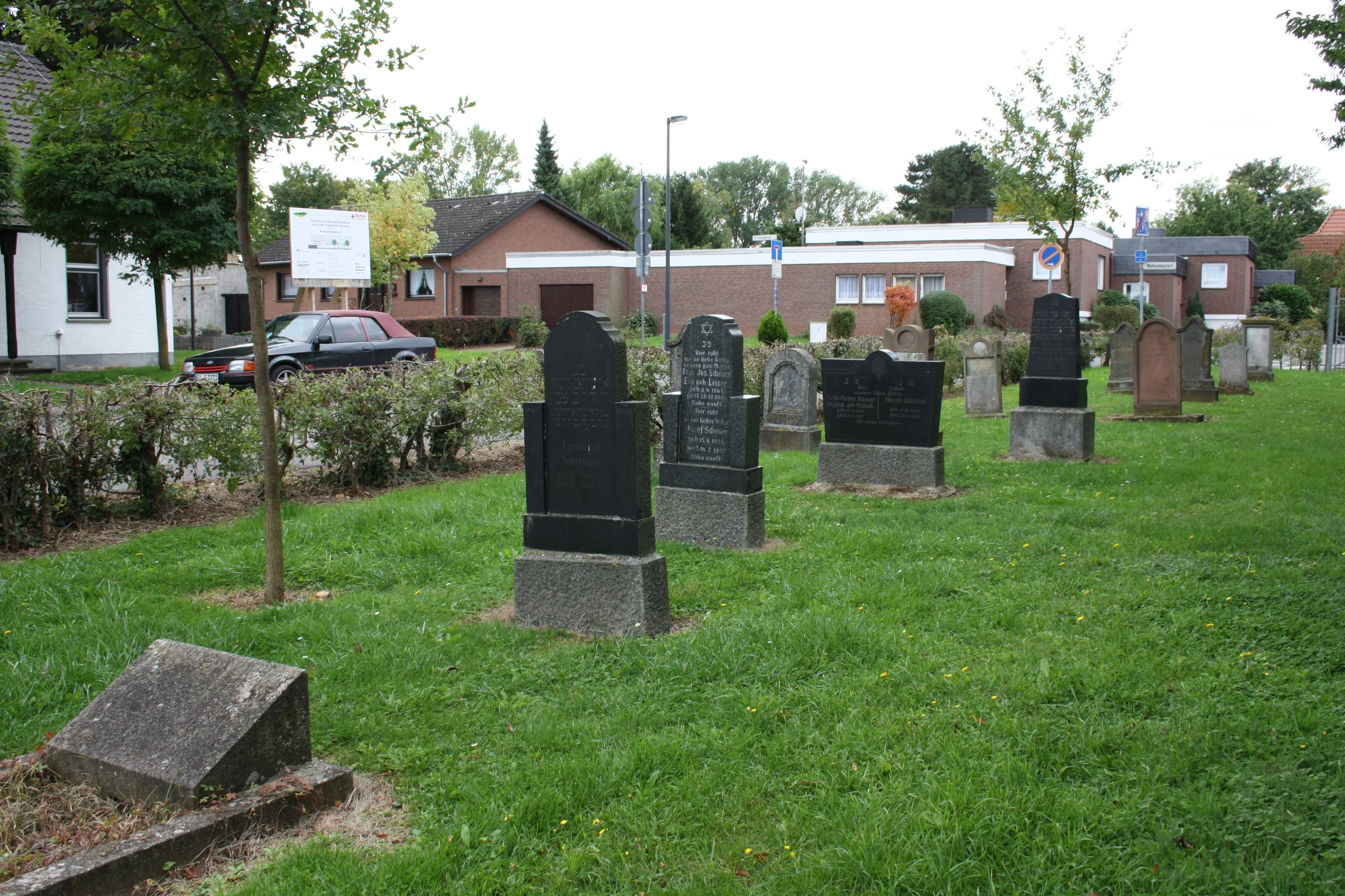 Jüdischer Friedhof in Sinzenich, Ansicht